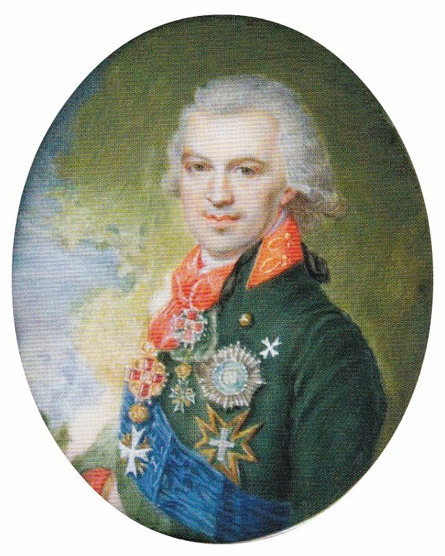 Пётр Хрисанфович Обольянинов (1753-1841)